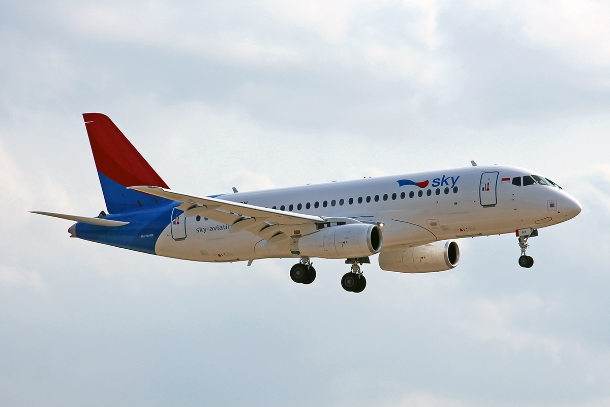 Sukhoi Superjet 100-95 (PK-ECN)